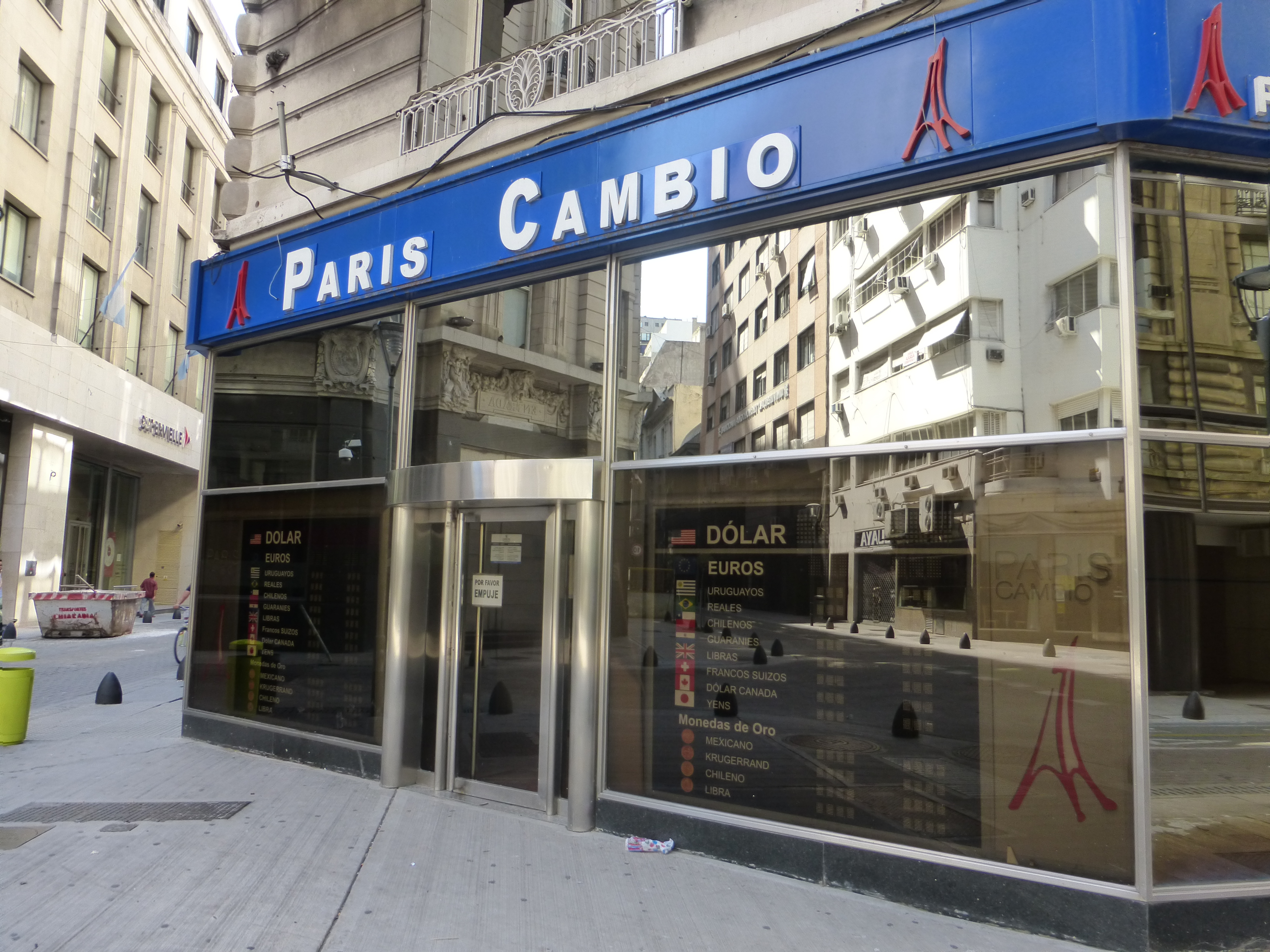 Casa de cambio "París", ubicada en la intersección de Sarmiento y Reconquista del barrio porteño de San Nicolás.